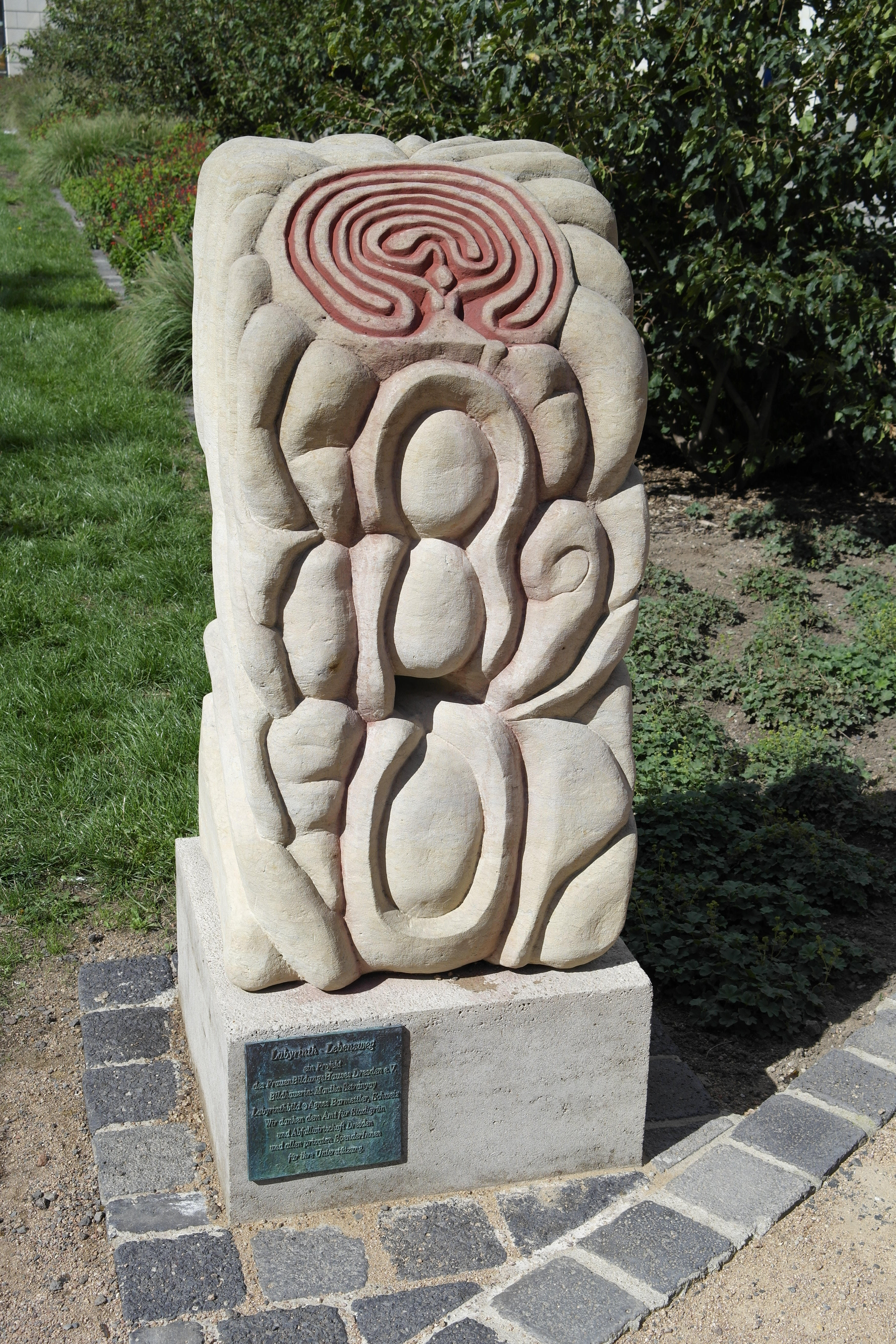 Dresden, Denkmal Labyrinth - Lebensweg von der Bildhauerin Agnes-Christina Barmettler aus der Schweiz